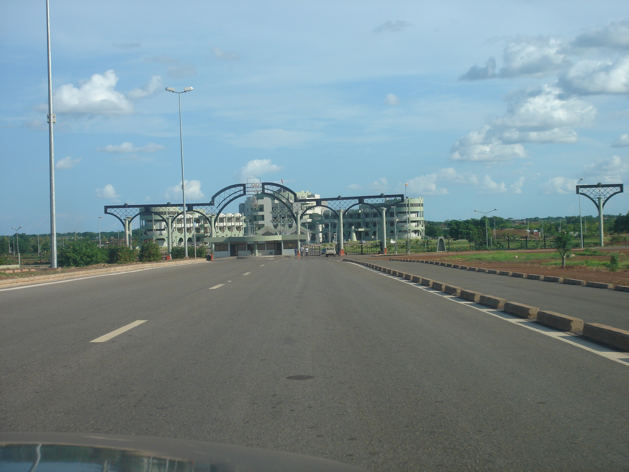 Palais Kosyam, Ouaga 2000, Ouagadougou, Burkina Faso. EN: new presidential palace. FR: Le nouveau palais présidentiel. DE: Der neue Präsidentschaftspalast. ES: El nuevo palacio presidencial